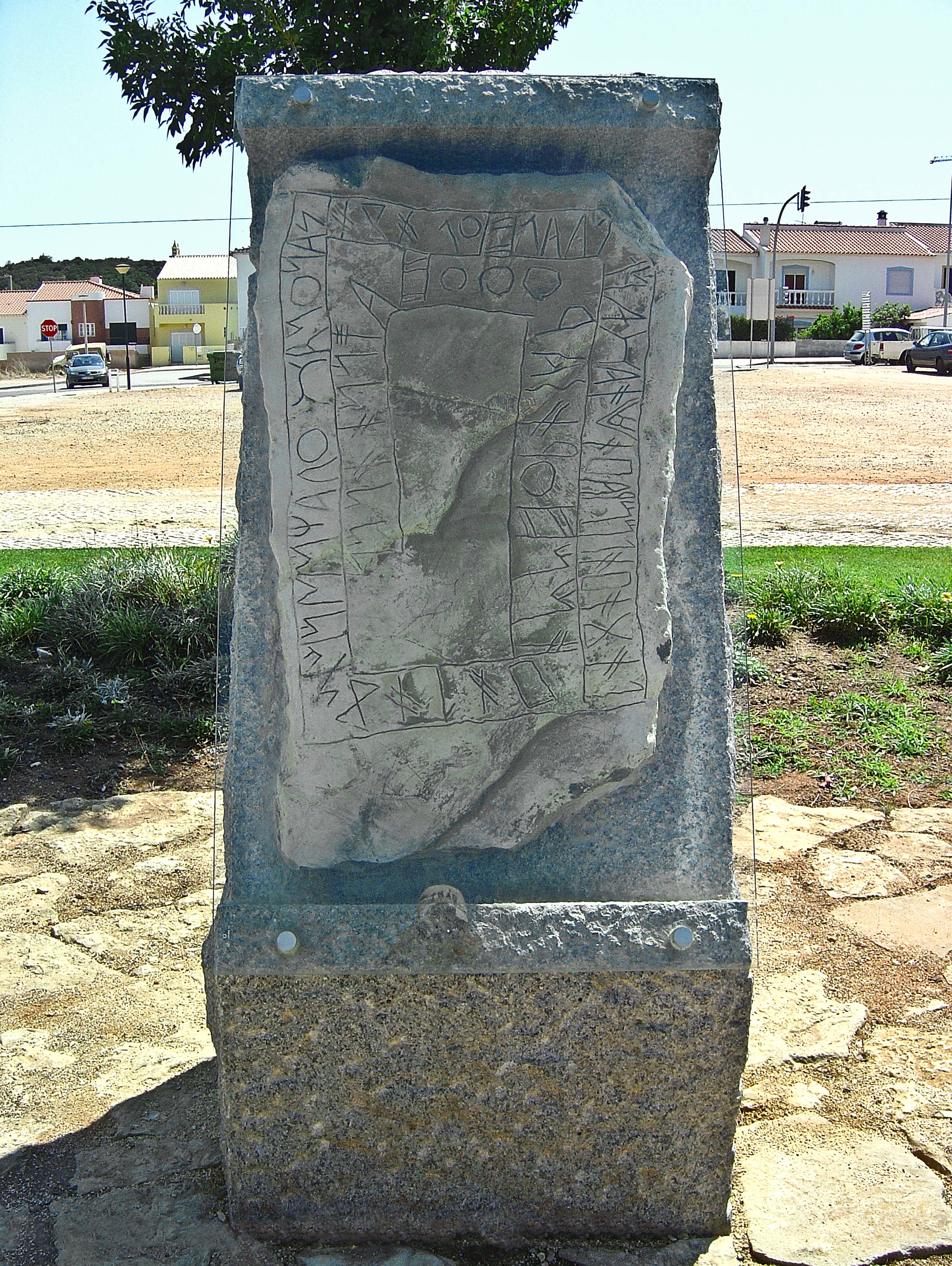 Un monumento con gran significado histórico para el pueblo de Bensafrim, concello de Lagos, en Algarve (Portugal). La "Estela" es una réplica del original que se encuentra en el Museo Municipal de Figueira da Foz. Ao ilustre Rabedd, muy nobre e honrado Konii. Ele repartiu os seus bens, suas herdades de lavoura, todas por nós seus concidadãos da área de Bensafrim, quando ele sentiu a aproximação de sua morte. Foi sempre muy estimado e respeitado pela sua reputação de bom homem. Quando do Seu enterro, nós o Povo Konii reunimos a redor de sua última morada, num acto de celebração solene de despedida, àquele que na realidade foi um verdadeiro ¡herói! e, lhe dedicámos este Heroun em agradecimento, como um monumento perpetuo em sua memória. E conforme o costume da tradição o colocámos ao alto na cabeceira de sua sepultura e enfeitada com dois ramos de palmas, como normalmente é posto a todos os consagrados ilustres homens e guerreiros peninsulares. Comunidade Konii Proto-histórica de Bensafrim. Monumento dedicado à memória de Rabedd, inaugurado a 23 de Junho de 2003. Estiveram presentes neste acto solene sua Excelência o Secretário do Ministério da Cultura Portuguesa, o Governador Civil da Cidade de Faro ( sua Excelência José Valentim Rosado ), o Presidente do Concelho da Cidade de Lagos, e outras personalidades da cultura portuguesa. See where this picture was taken. [?]